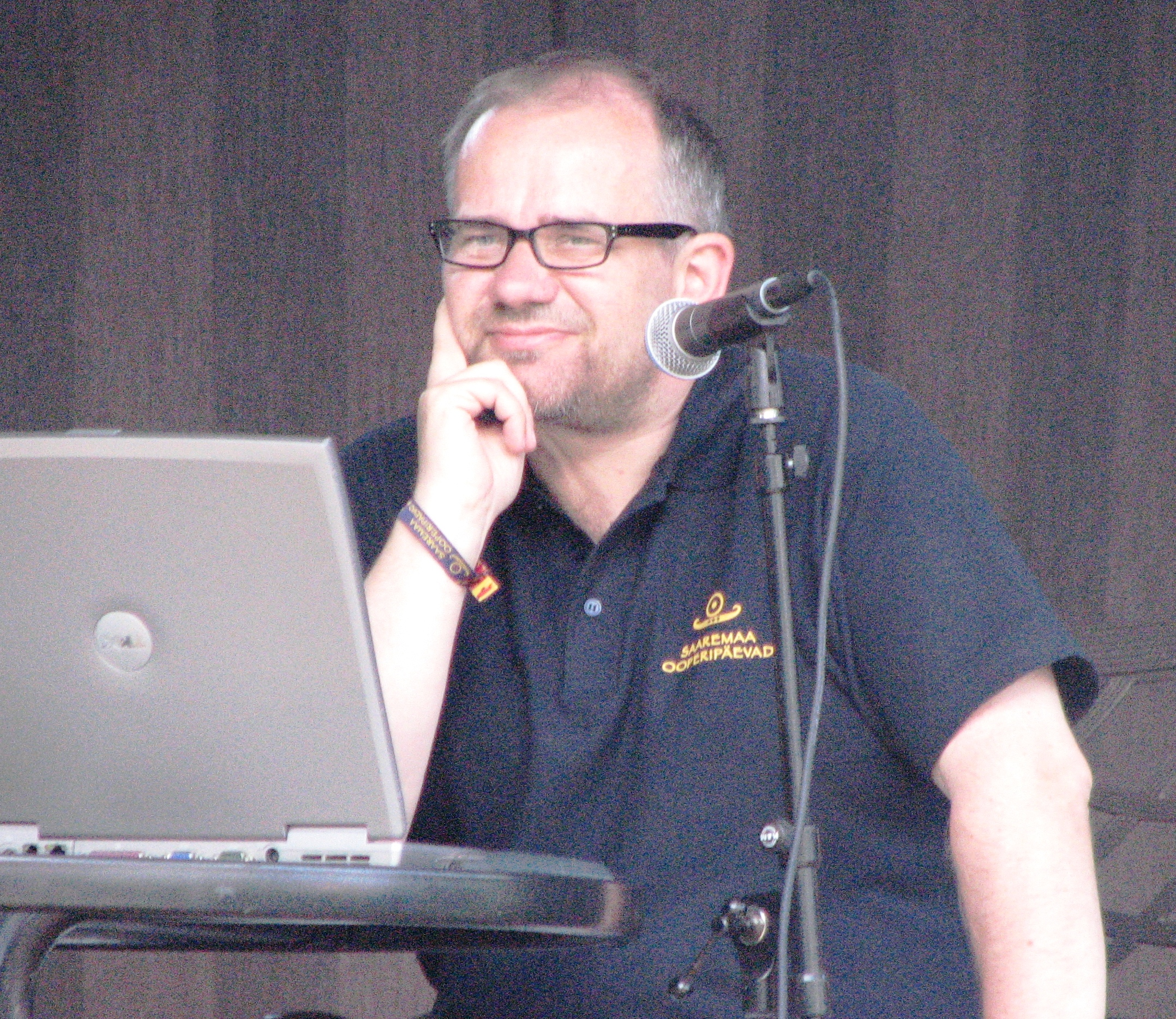 Lauri Aav esinemas Kuressaare Arensburgi ooperikohvikus